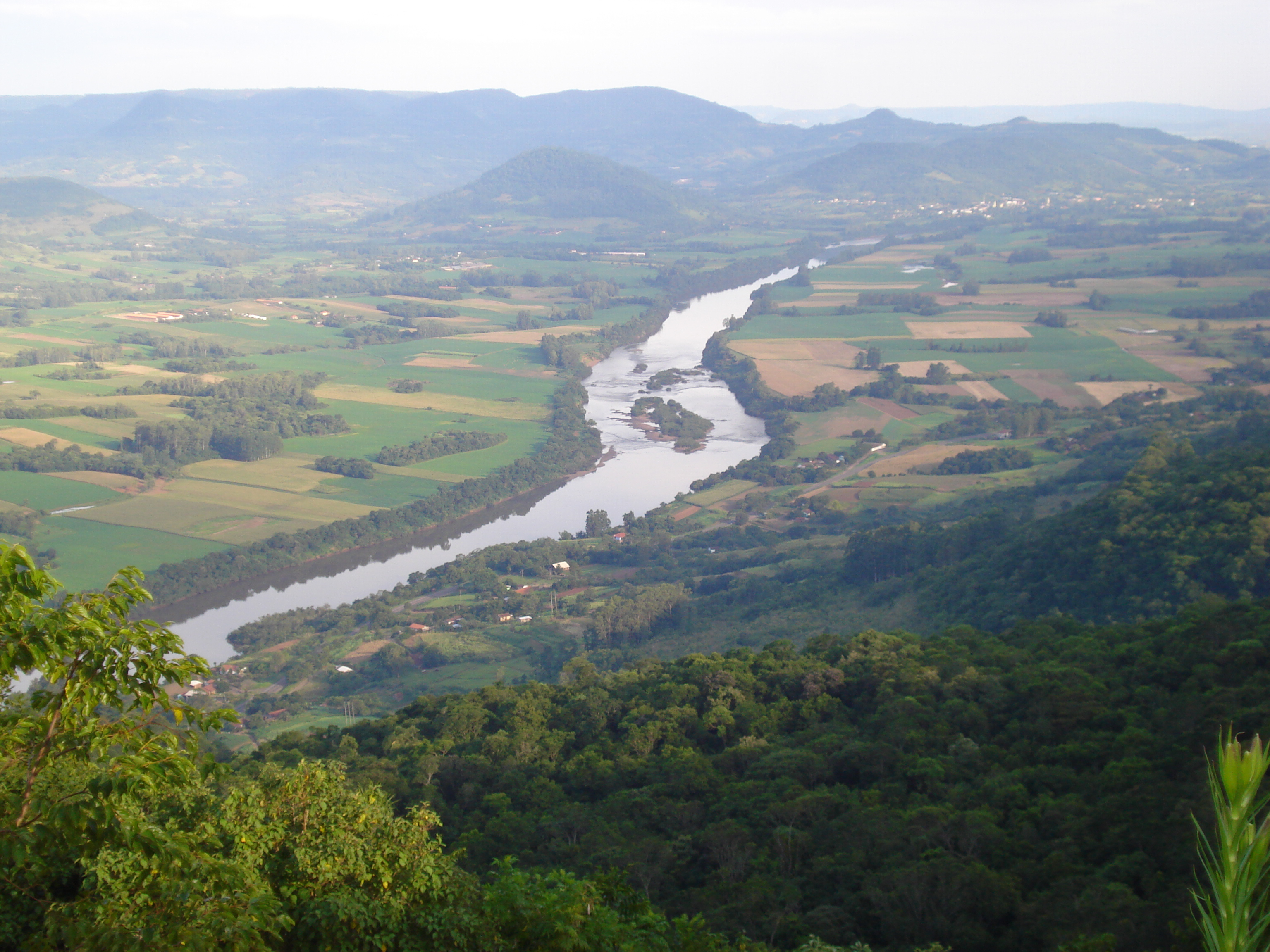 Vista do topo do Morro Gaúcho. Ao fundo o Rio Taquari.